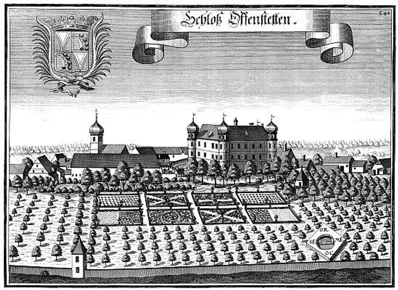 Schloss Offenstetten, Landkreis Kelheim, Niederbayern: Kupferstich von Michael Wening um 1700